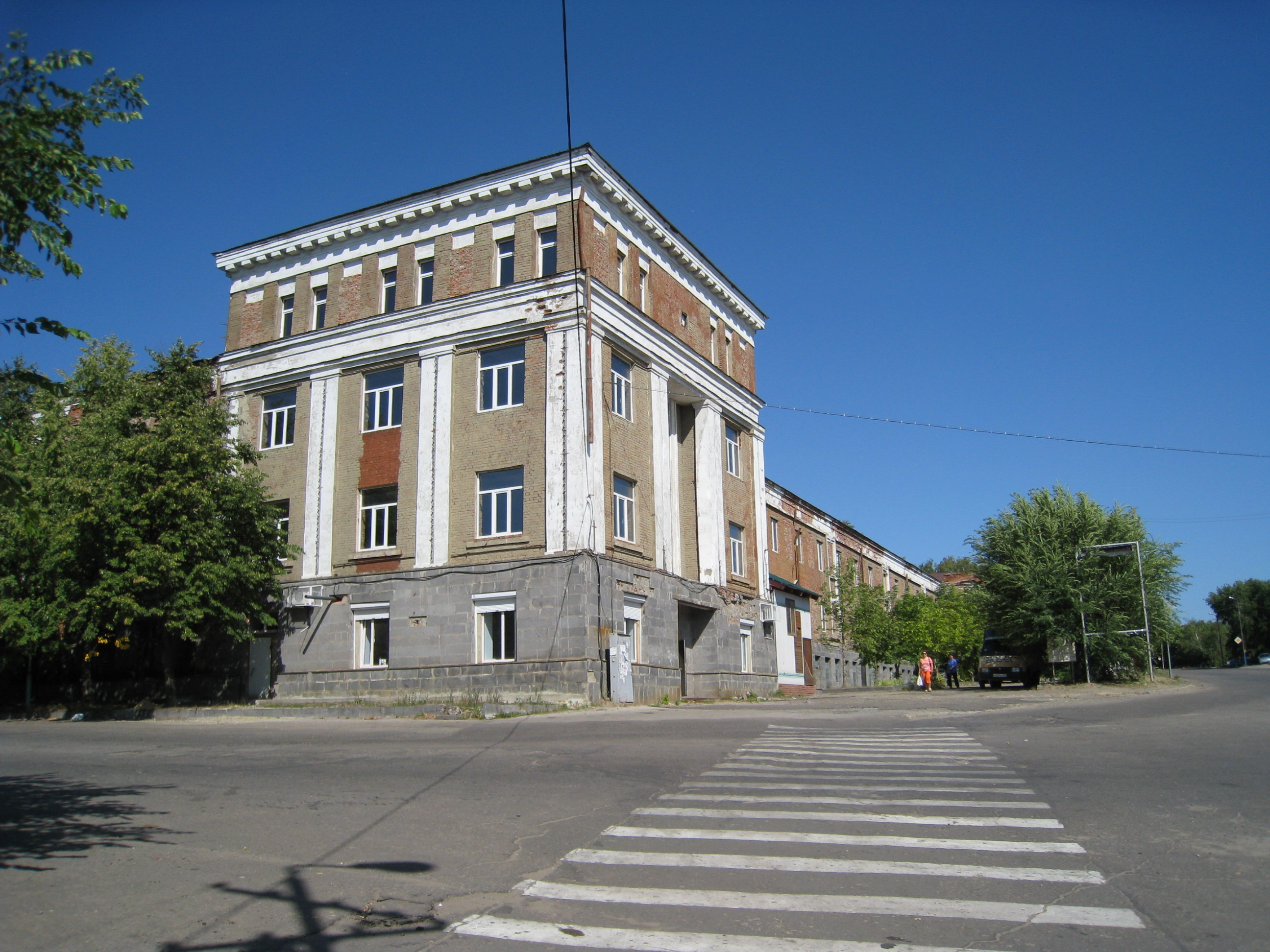 Часовой завод, 2009 год